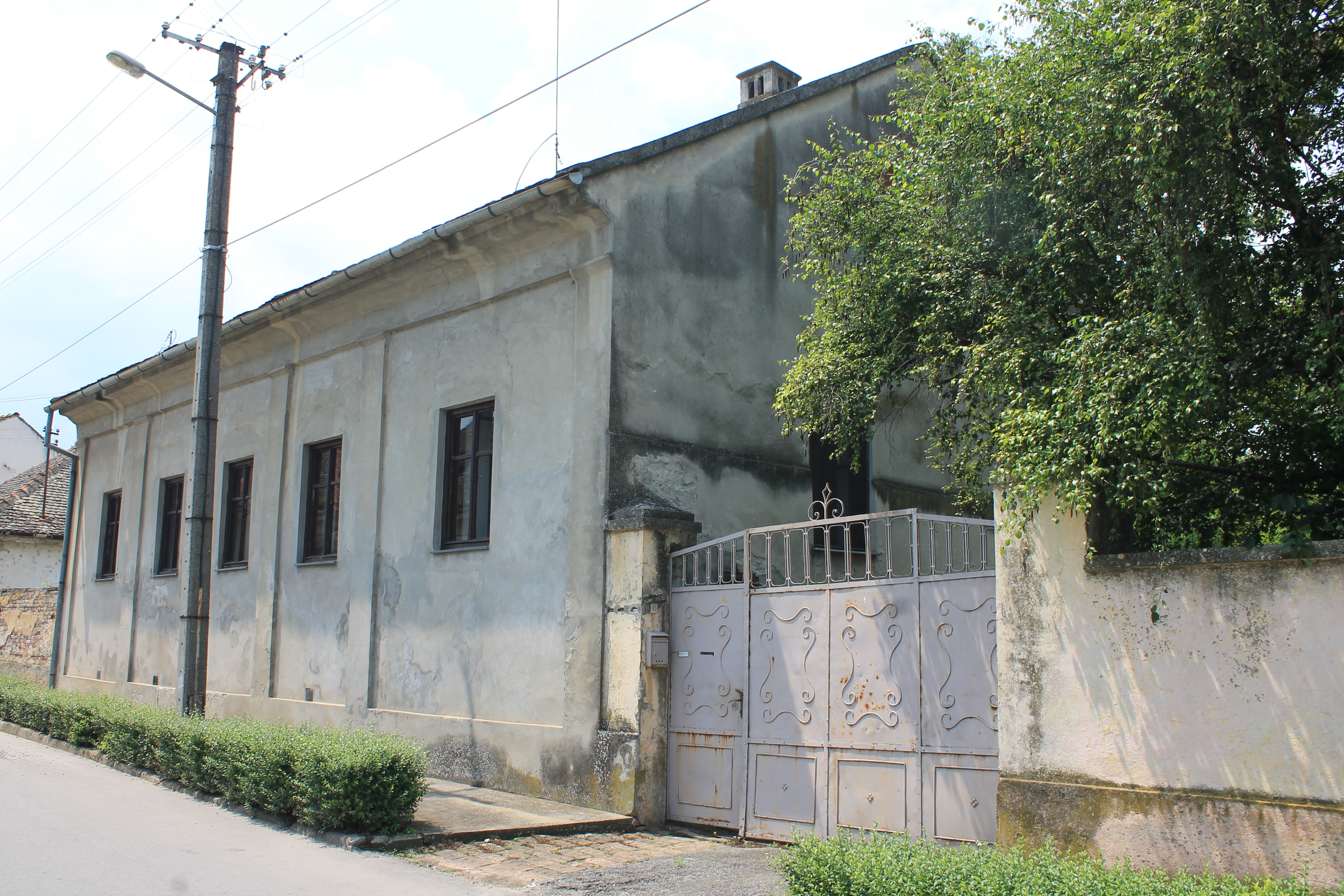 Kuća u Dunavskoj 5, Sremska Kamenica